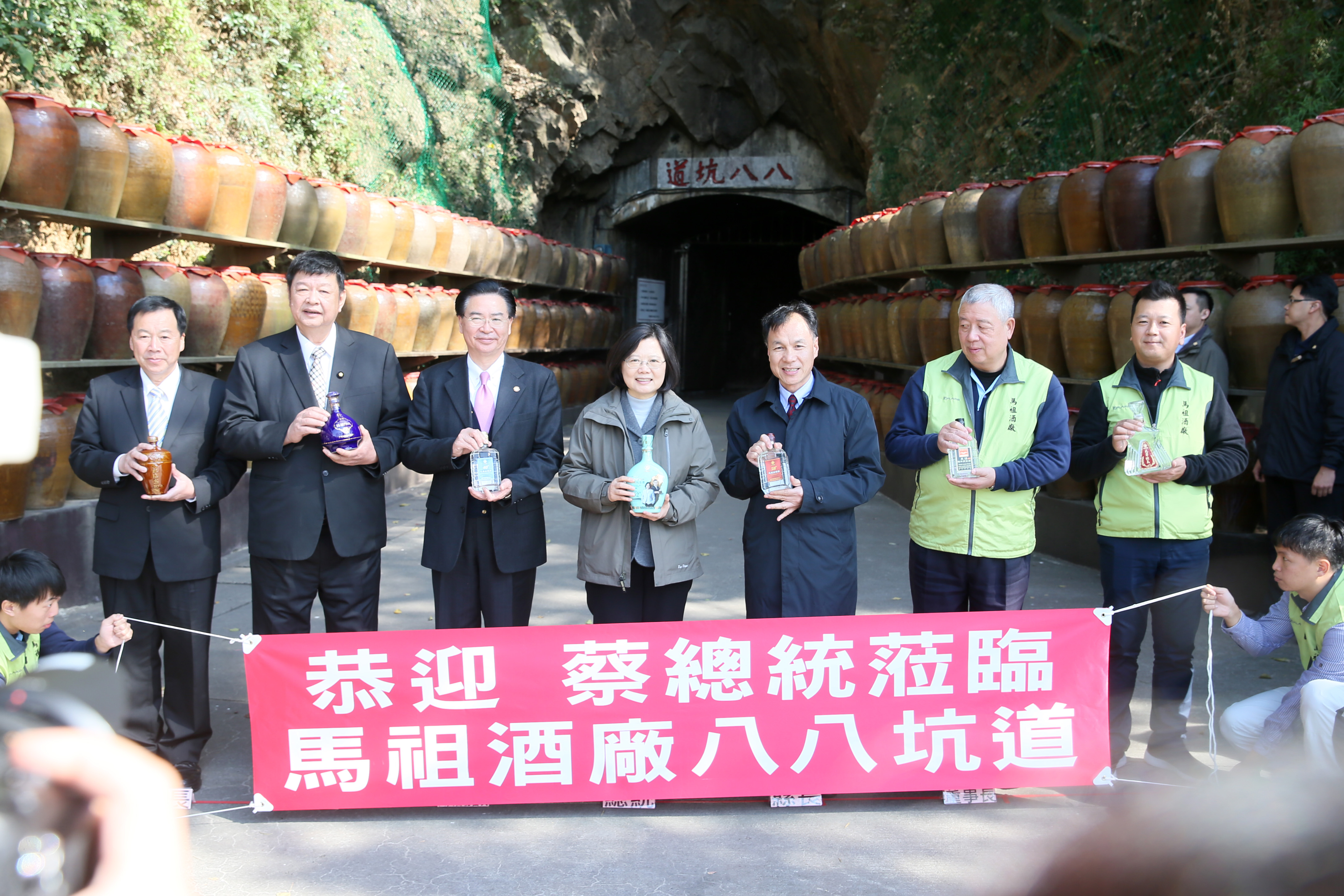 蔡英文前往馬祖酒廠八八坑道